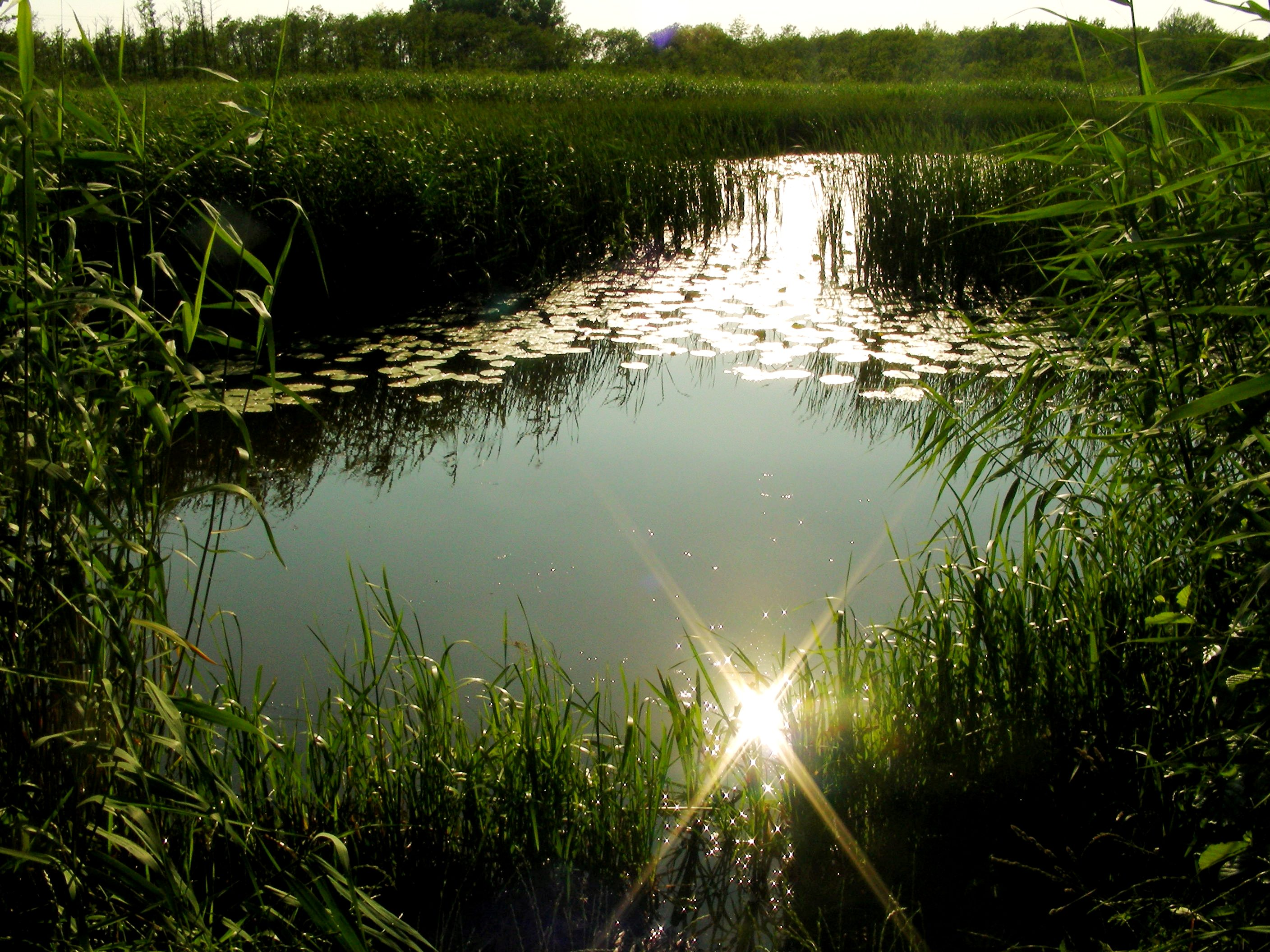 Rezerwat przyrody Staw Nowokuźnicki, gmina Prószków, województwo Opolskie, Polska